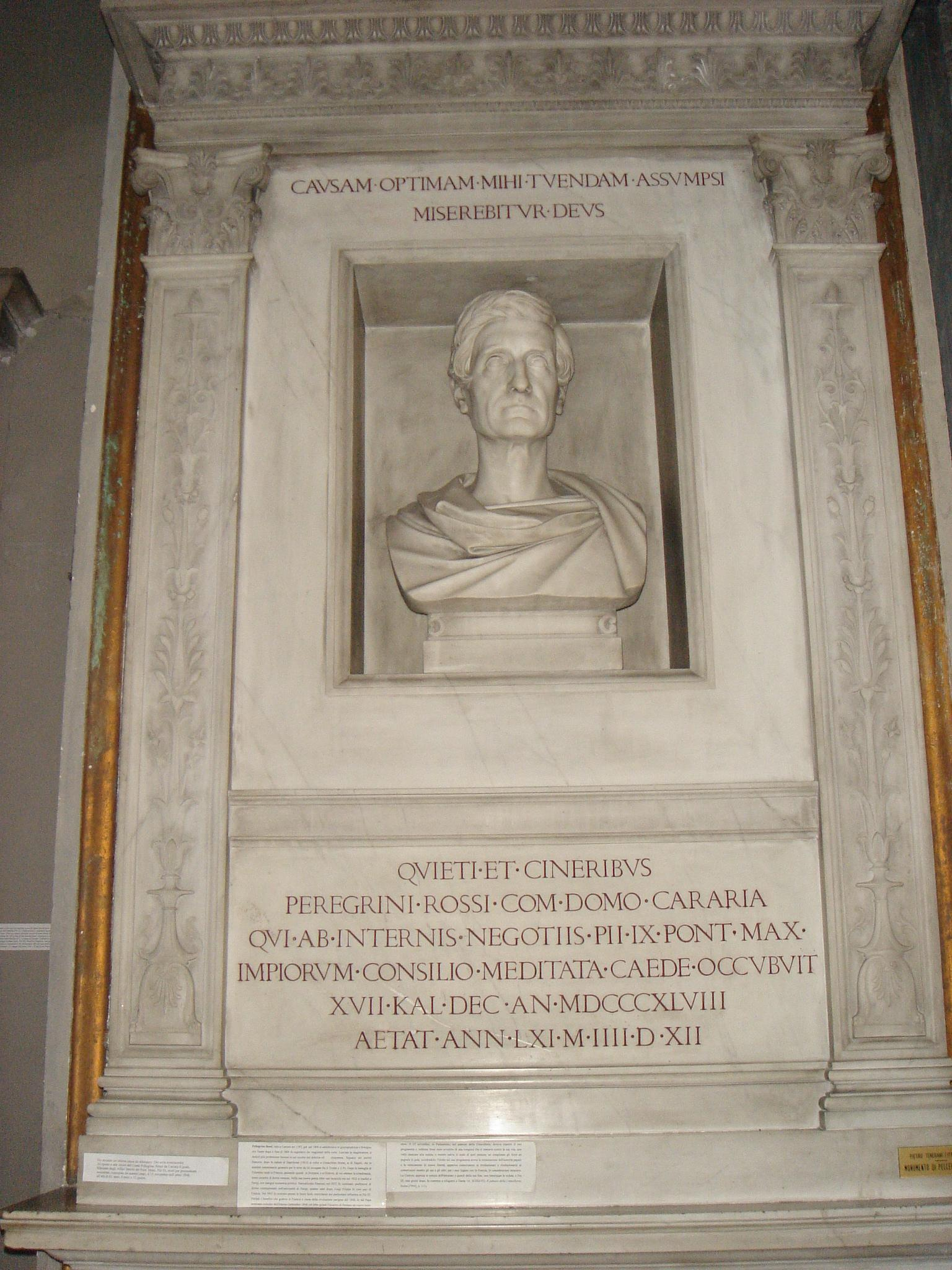 Roma, palazzo della Cancelleria: monumento funebre di Pellegrino Rossi nel luogo in cui fu assassinato.